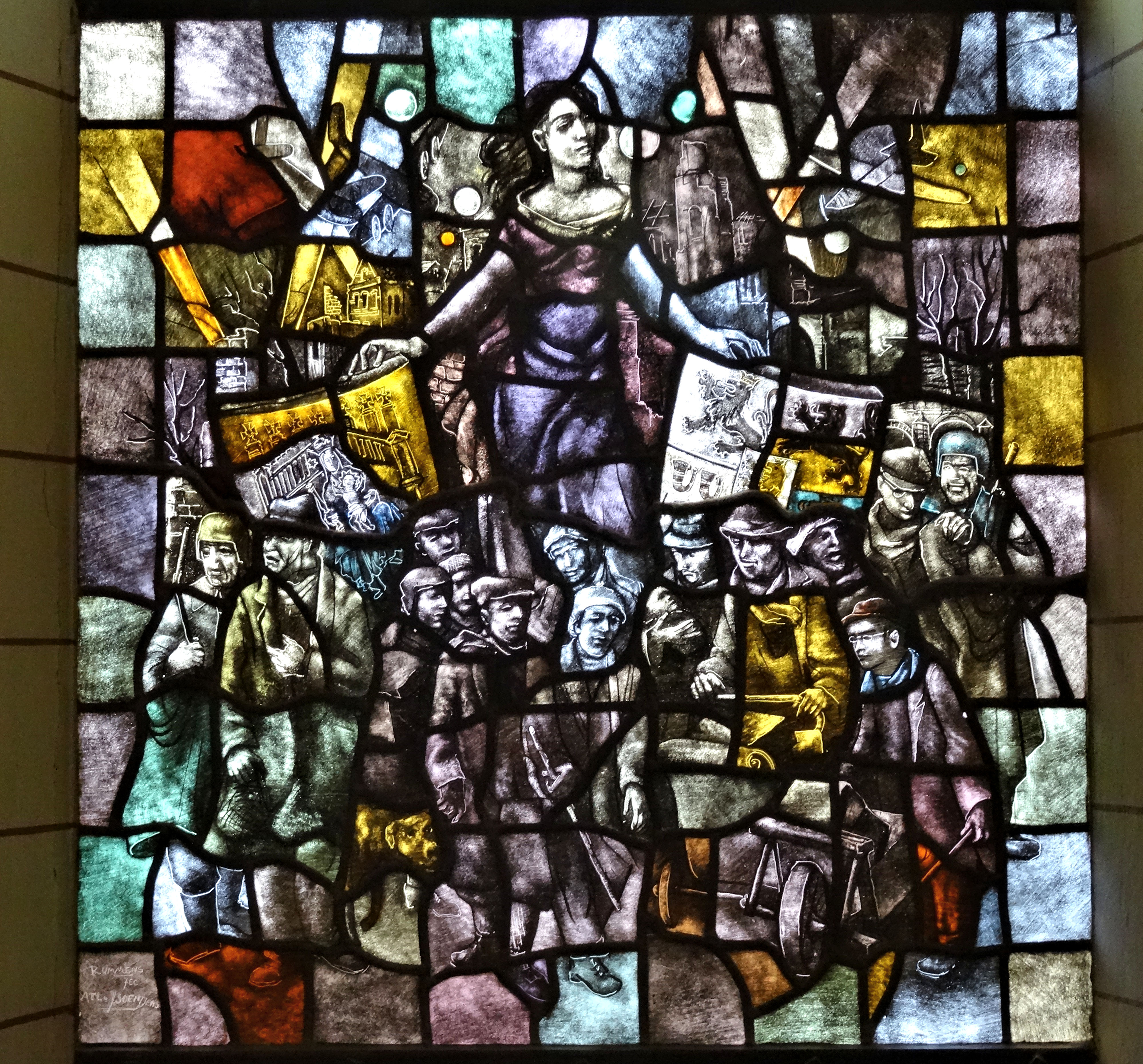 Gedenkraam Limburgse evacués (1949), ontworpen door Jules Rummens en uitgevoerd in het atelier van J. Soentjens in Roermond. Het raam is geplaatst in het trappenhuis van het voormalig provinciehuis aan de Brink in Assen, tegenwoordig onderdeel van het Drents Museum.